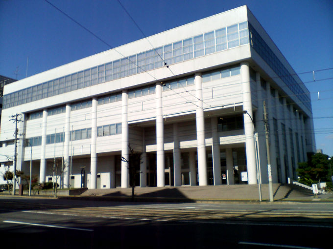 猫田記念体育館